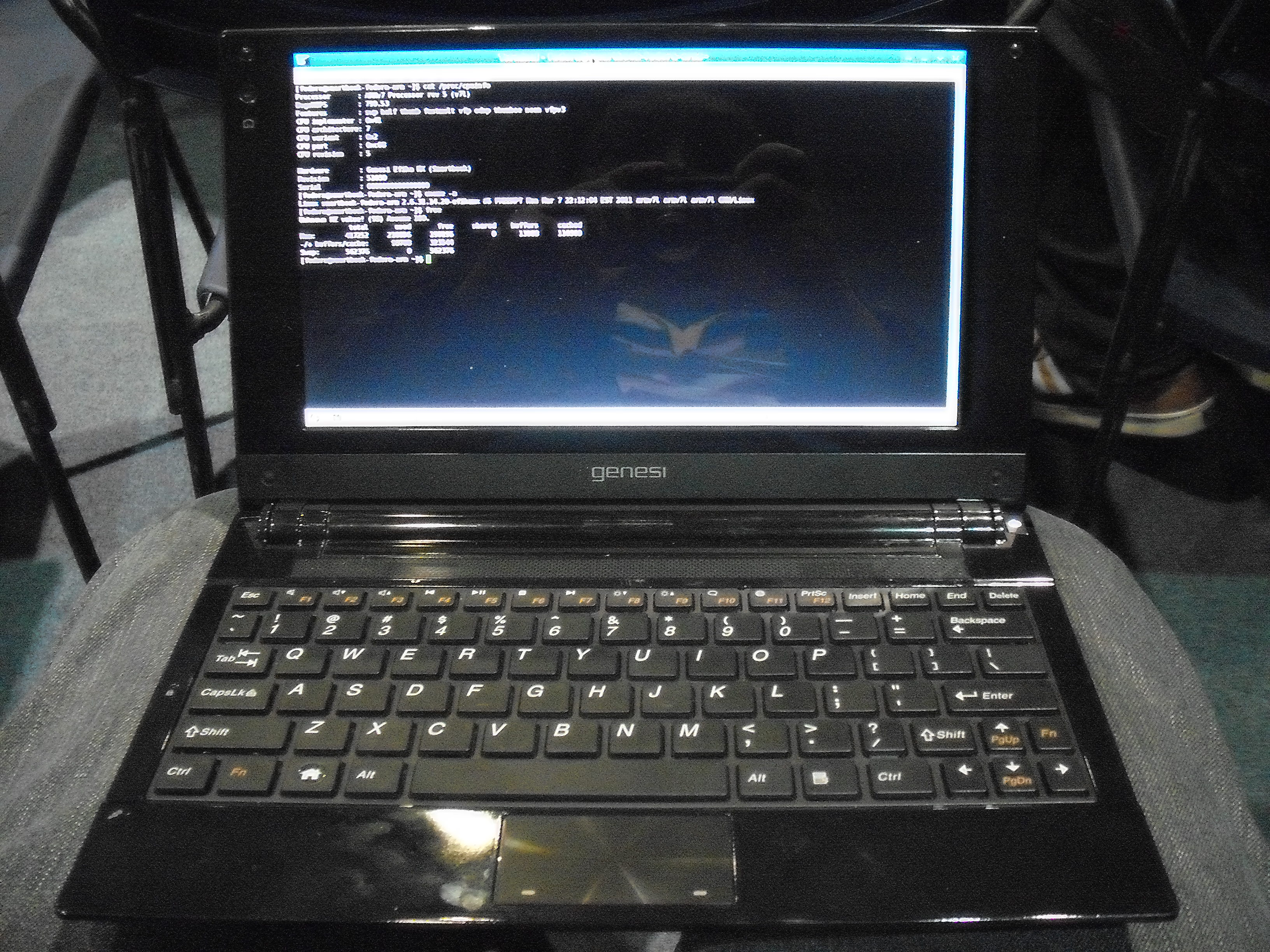 Originalmente rodam Ubuntu, mas este estava rodando Fedora 13.